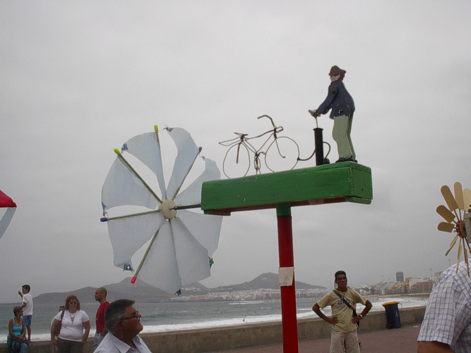 Whirligig 11